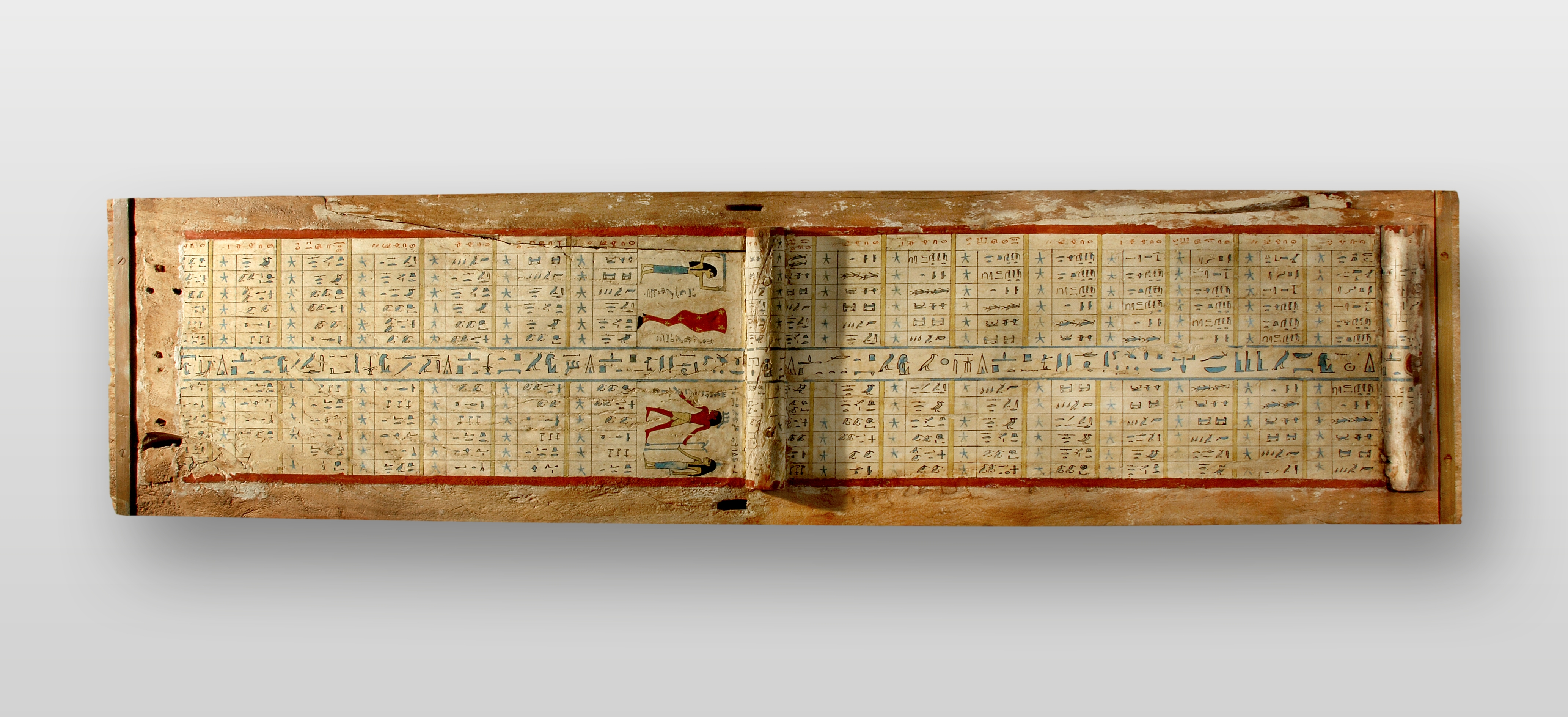 Sarkophag des Idi, Sargdeckel ganz, Museum der Universität Tübingen MUT